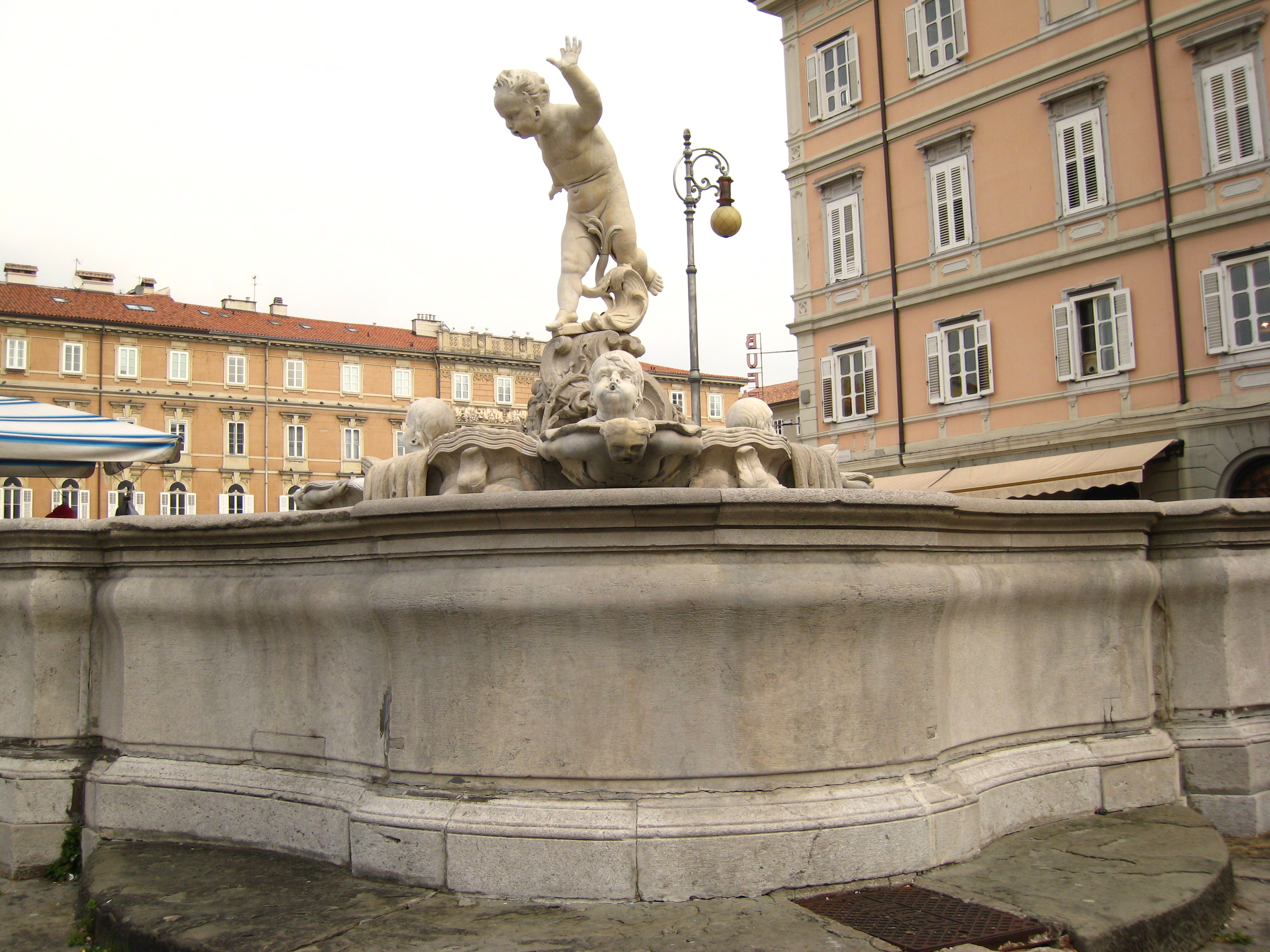 Fontana del Giovannin del Ponterosso: fountain in square Ponterosso - Trieste - Italy